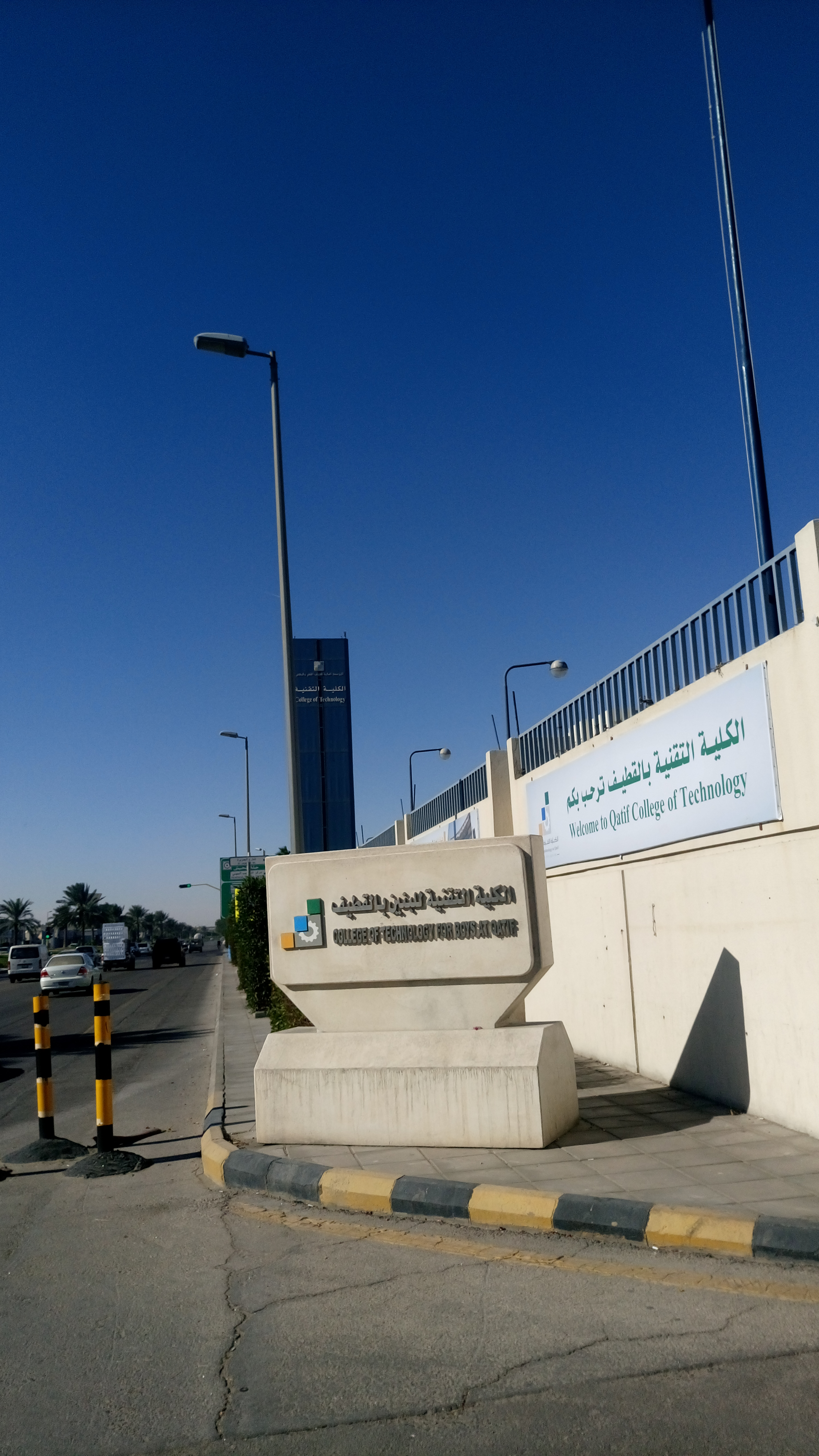 صورة أمامية للمعهد التقني بالقطيف، الذي افتتح عام 2009م.